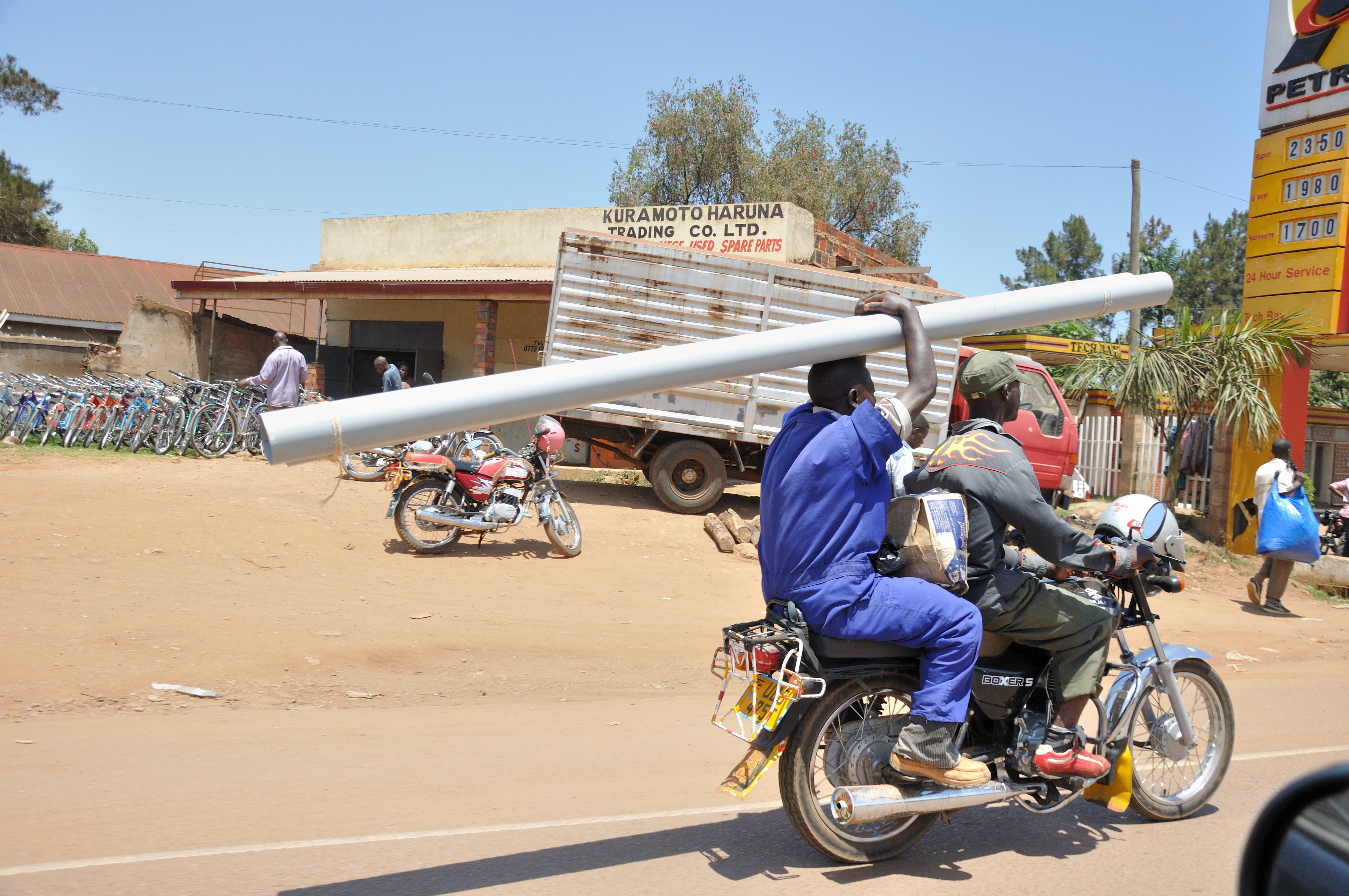 Uganda, Street views between Kampala and Entebbe